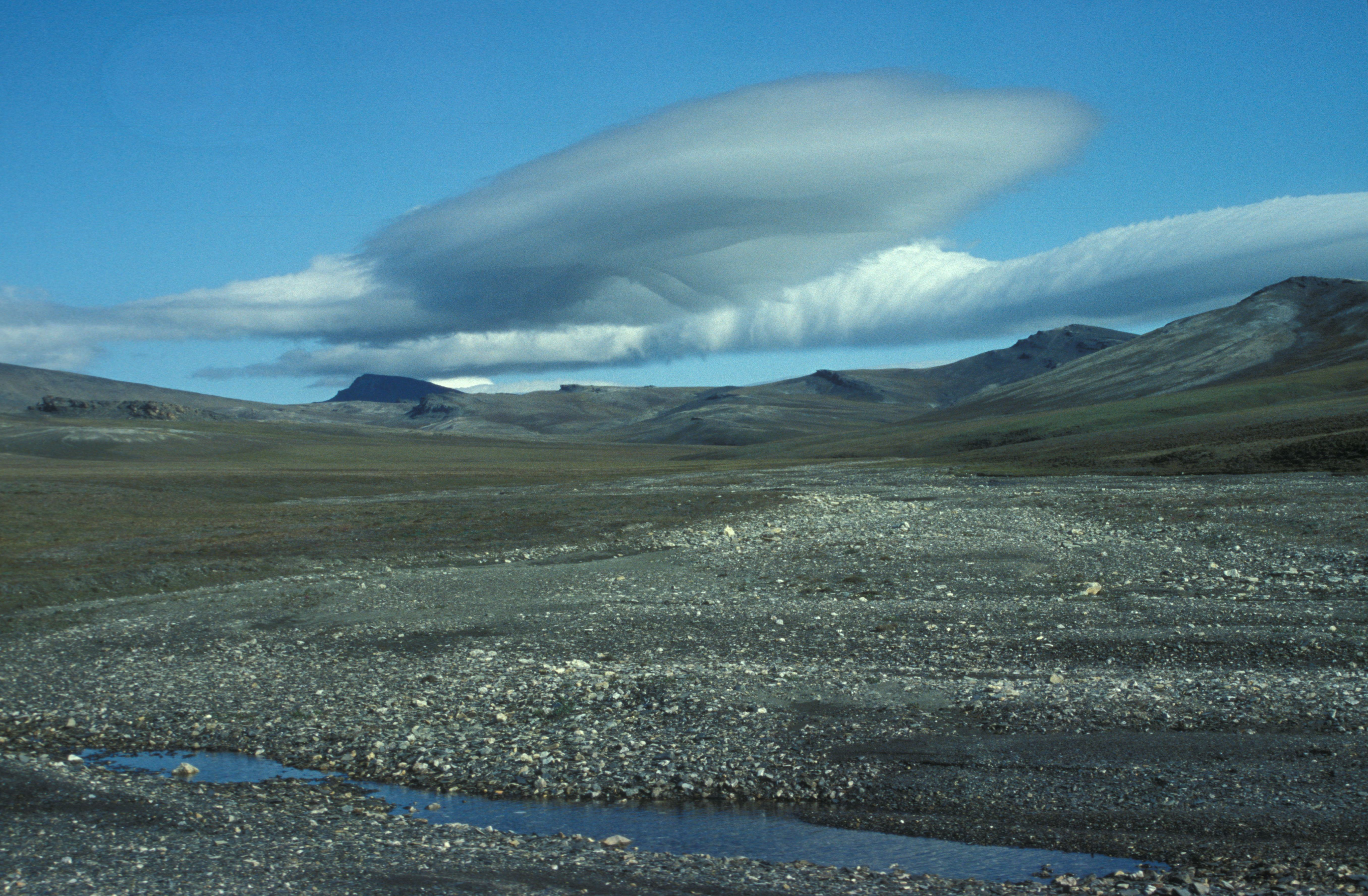 Остров Врангеля, Иультинский район This image is related to the protected area of Russia number 8700024